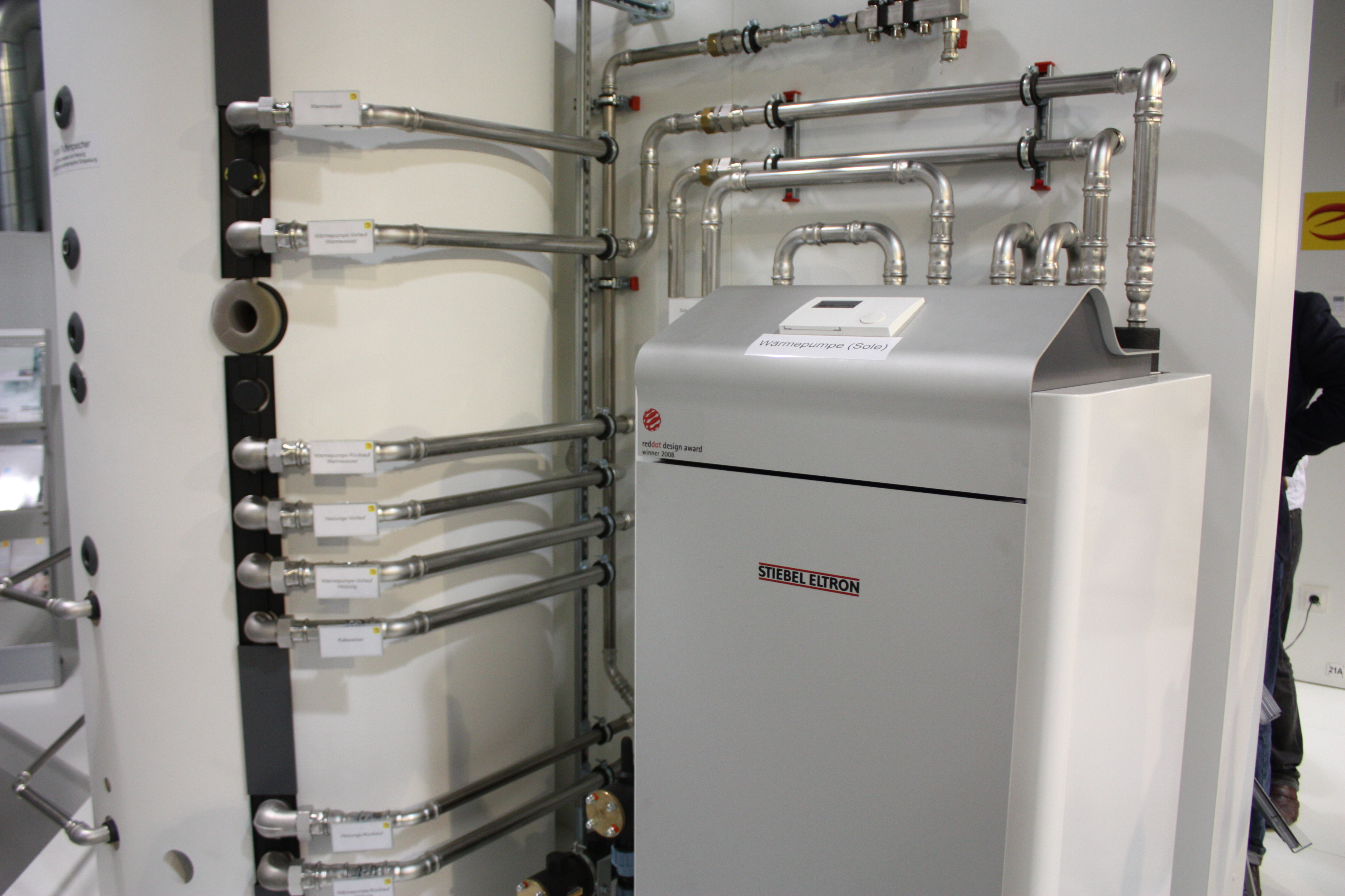 IFA 2010, Berlin; Wärmepumpe (Sole)